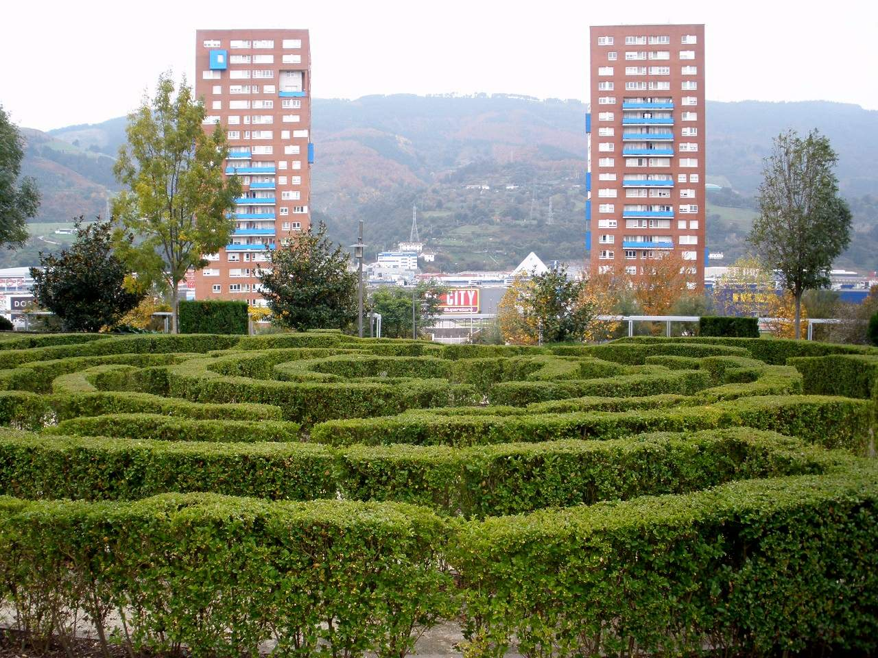 Jardín Botánico de Barakaldo (Bizkaia)